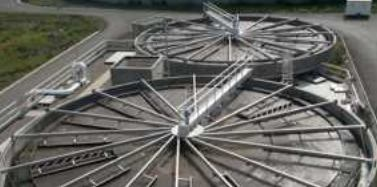 Flottateur en eau usée huilerie alimentaire